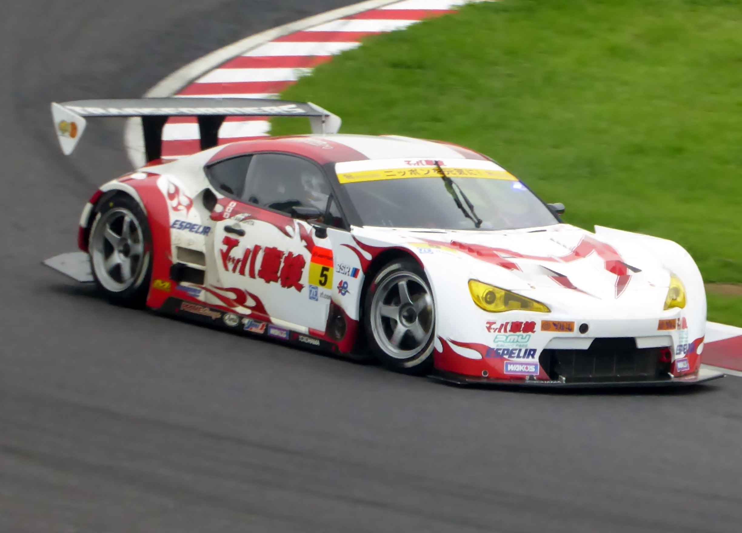 2015年鈴鹿1000㎞において5号車マッハ車検withいらこん86c-westを撮影。